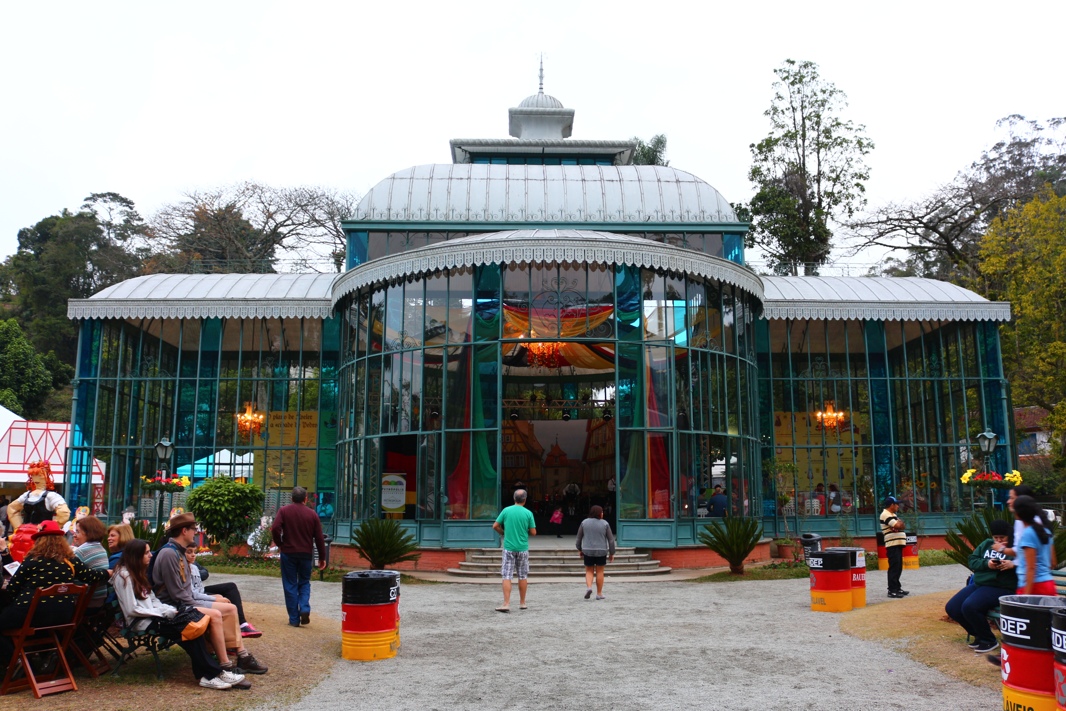 Palácio de Cristal e Praça da Confluência